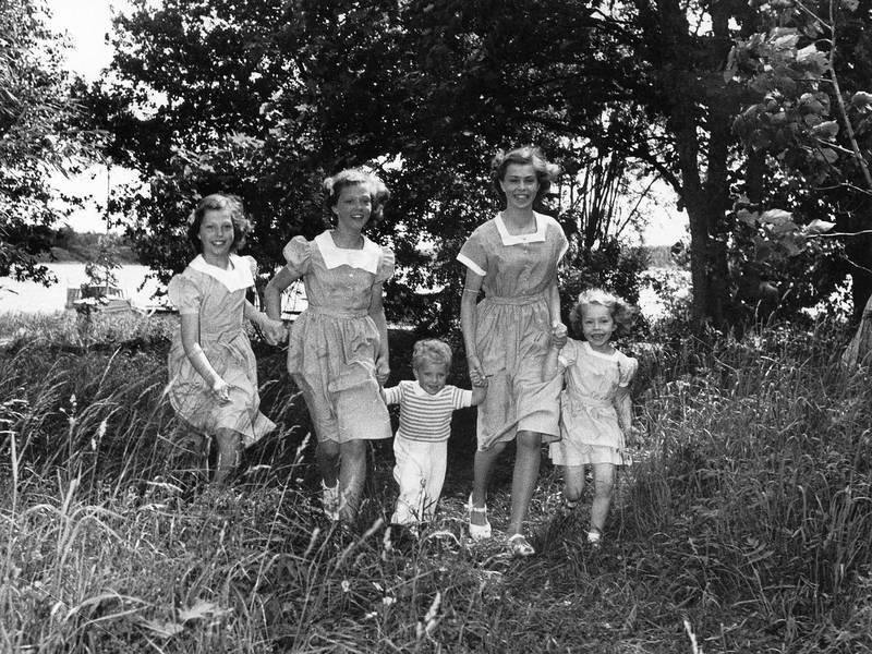 "Hagasessorna" i Hagaparken 1948. Från vänster: Desirée, Birgitta, Carl Gustav, Margaretha och Christina